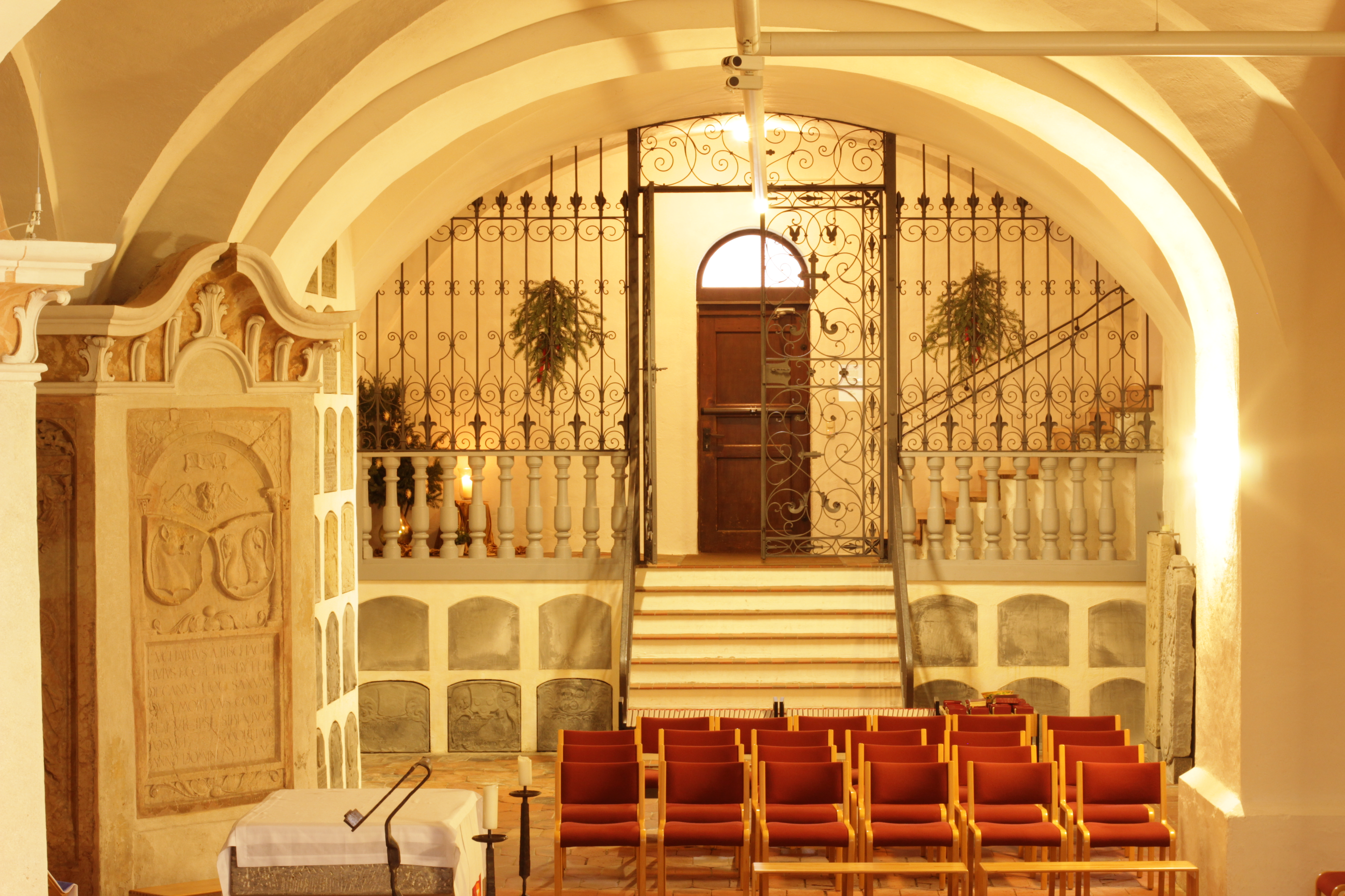 Krypta, Basilika St. Lorenz, Kempten